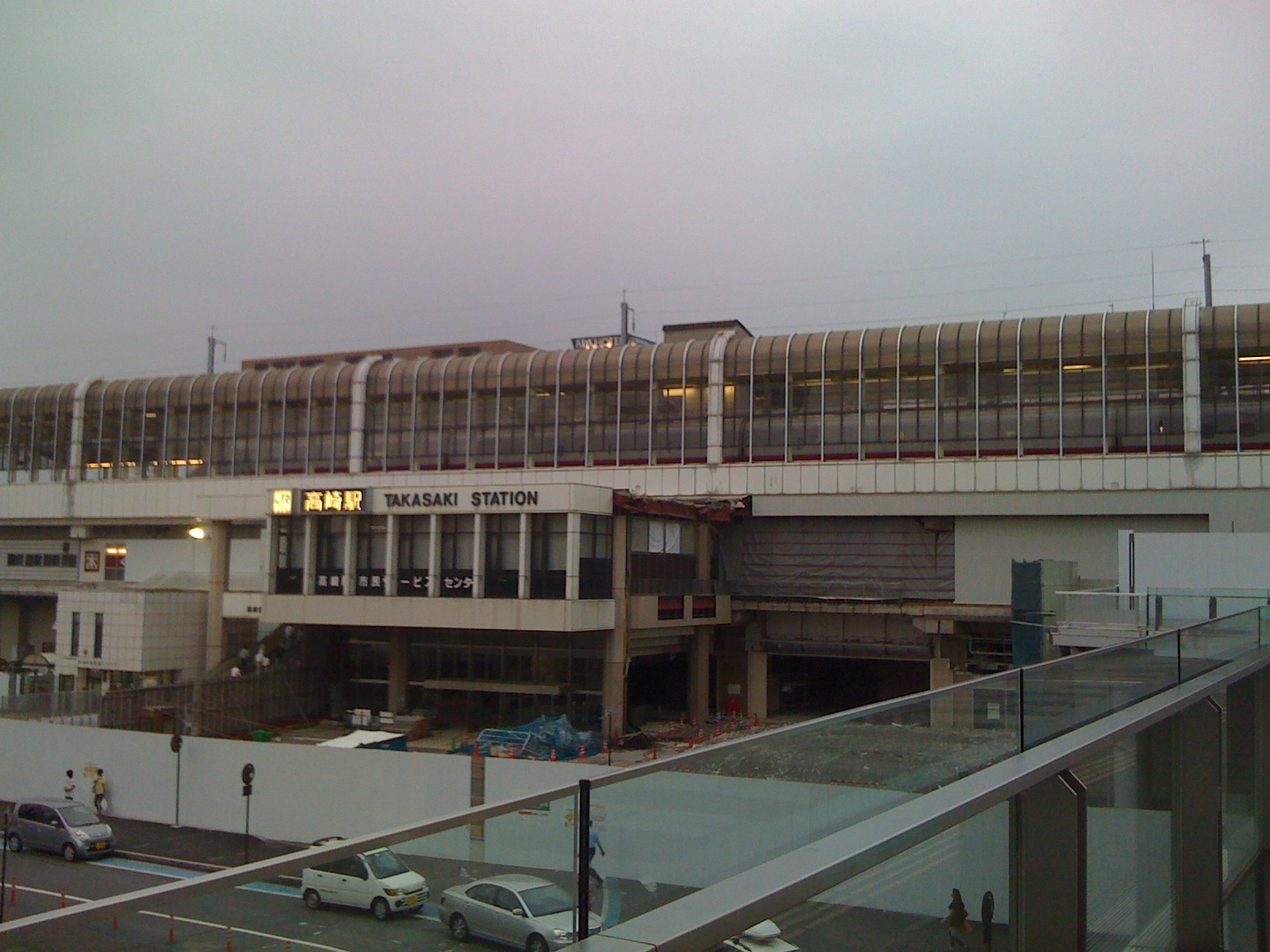 高崎駅東口